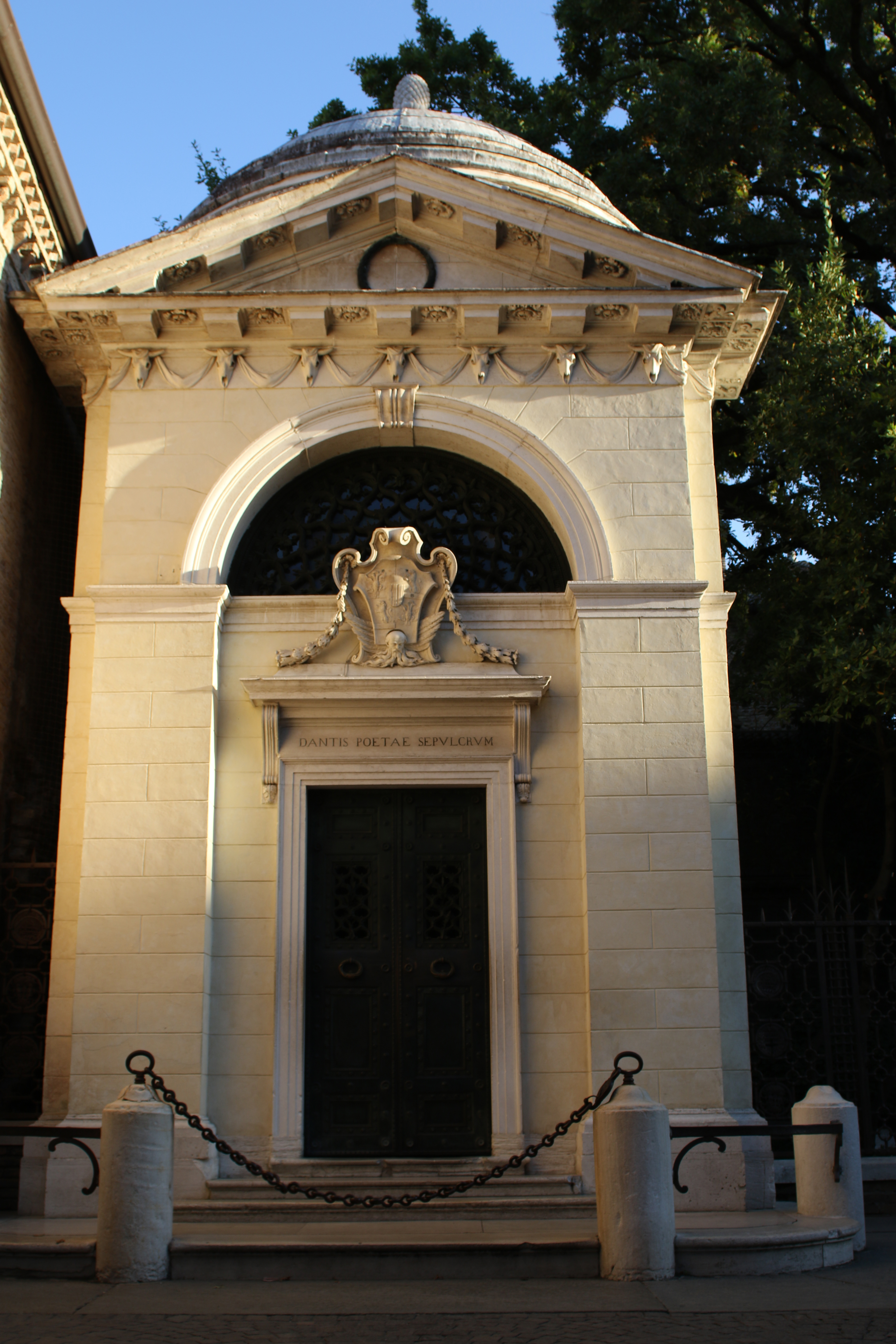 Zona Dantesca e Tomba di Dante entrata alla tomba di dante This is a photo of a monument which is part of cultural heritage of Italy.